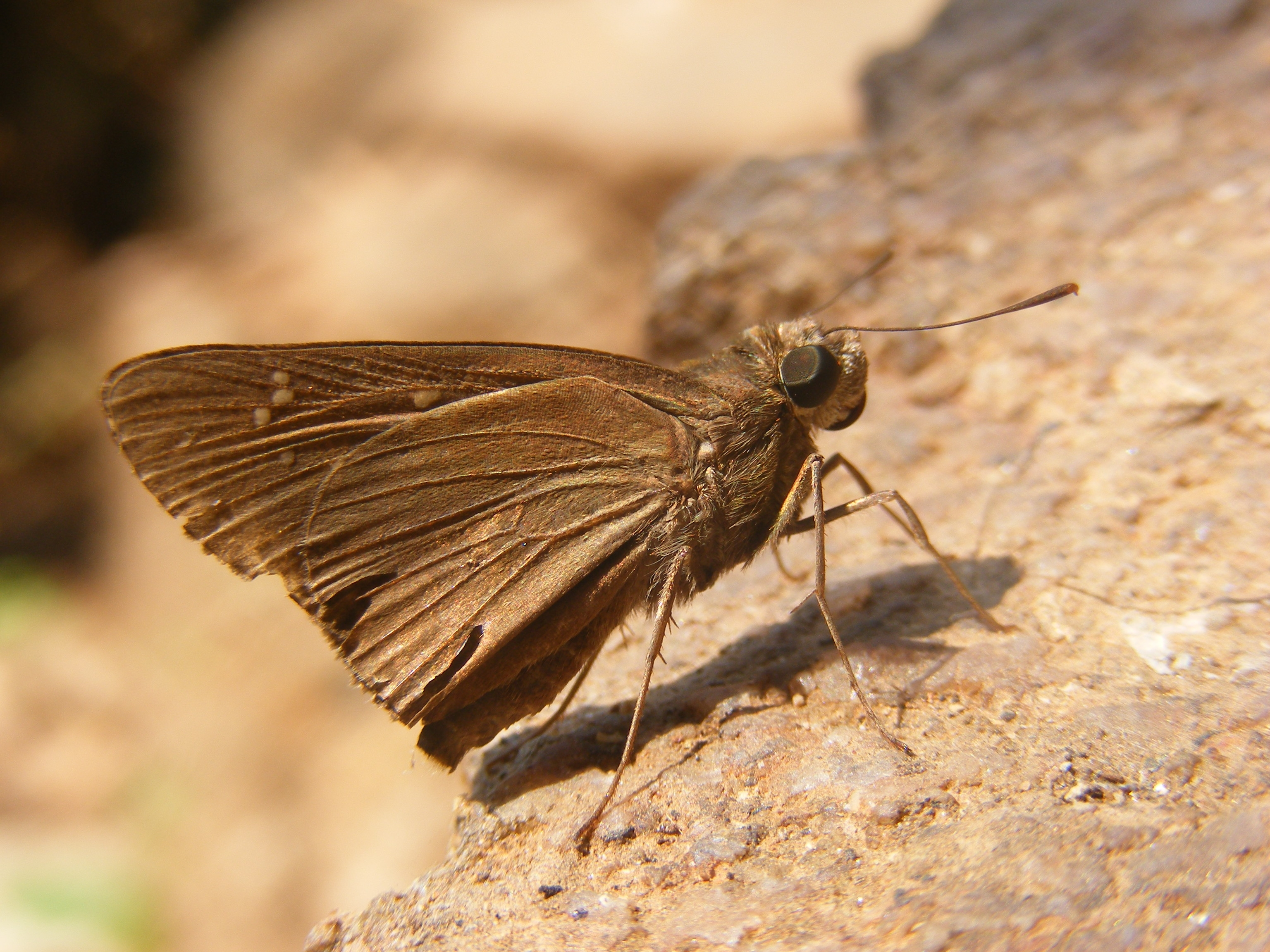 Baoris farri Moore. Family - Hesperiidae